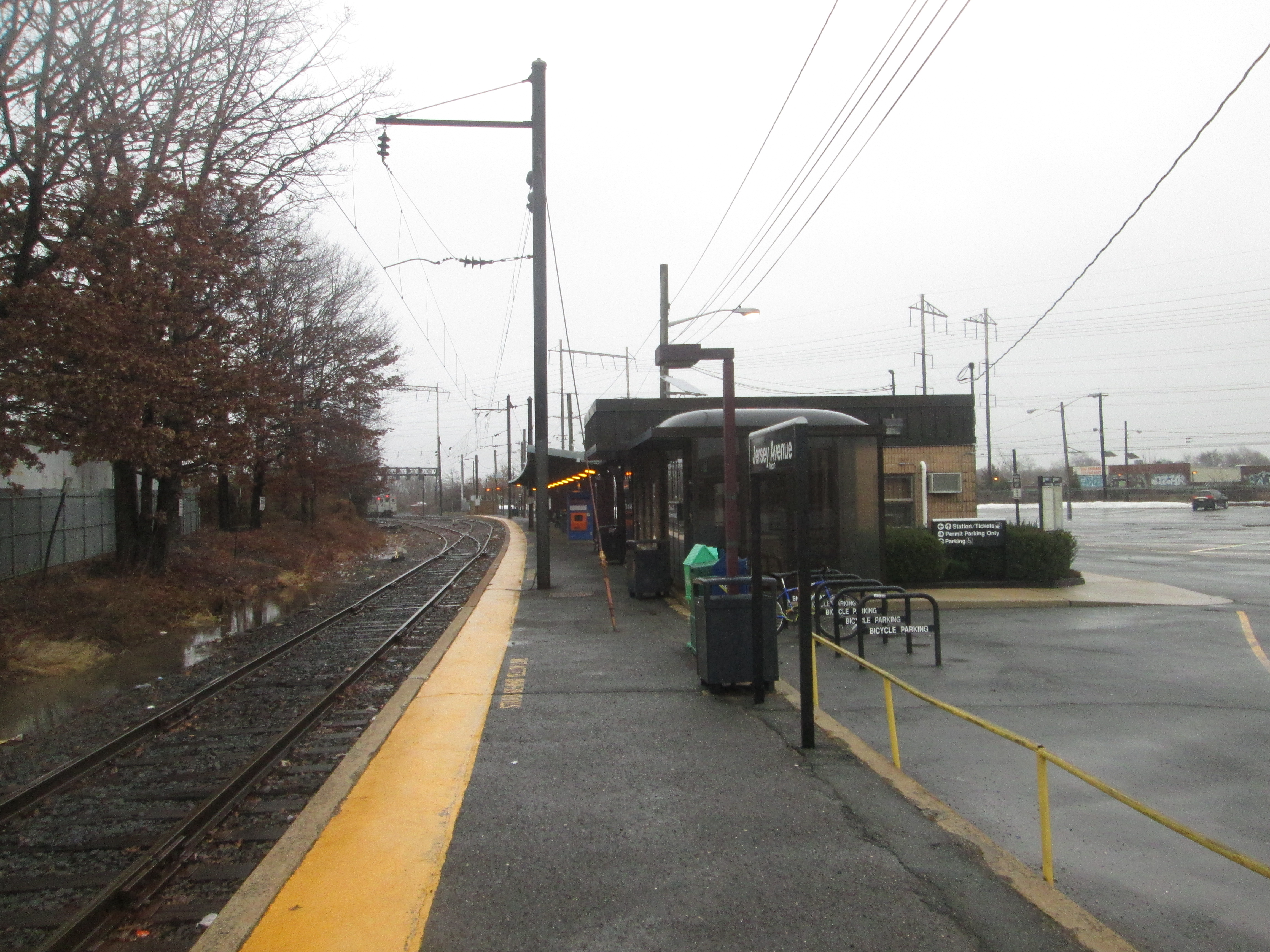 New Brunswick, New Jersey